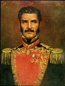 Portrait of venezuela general Jacinto Lara